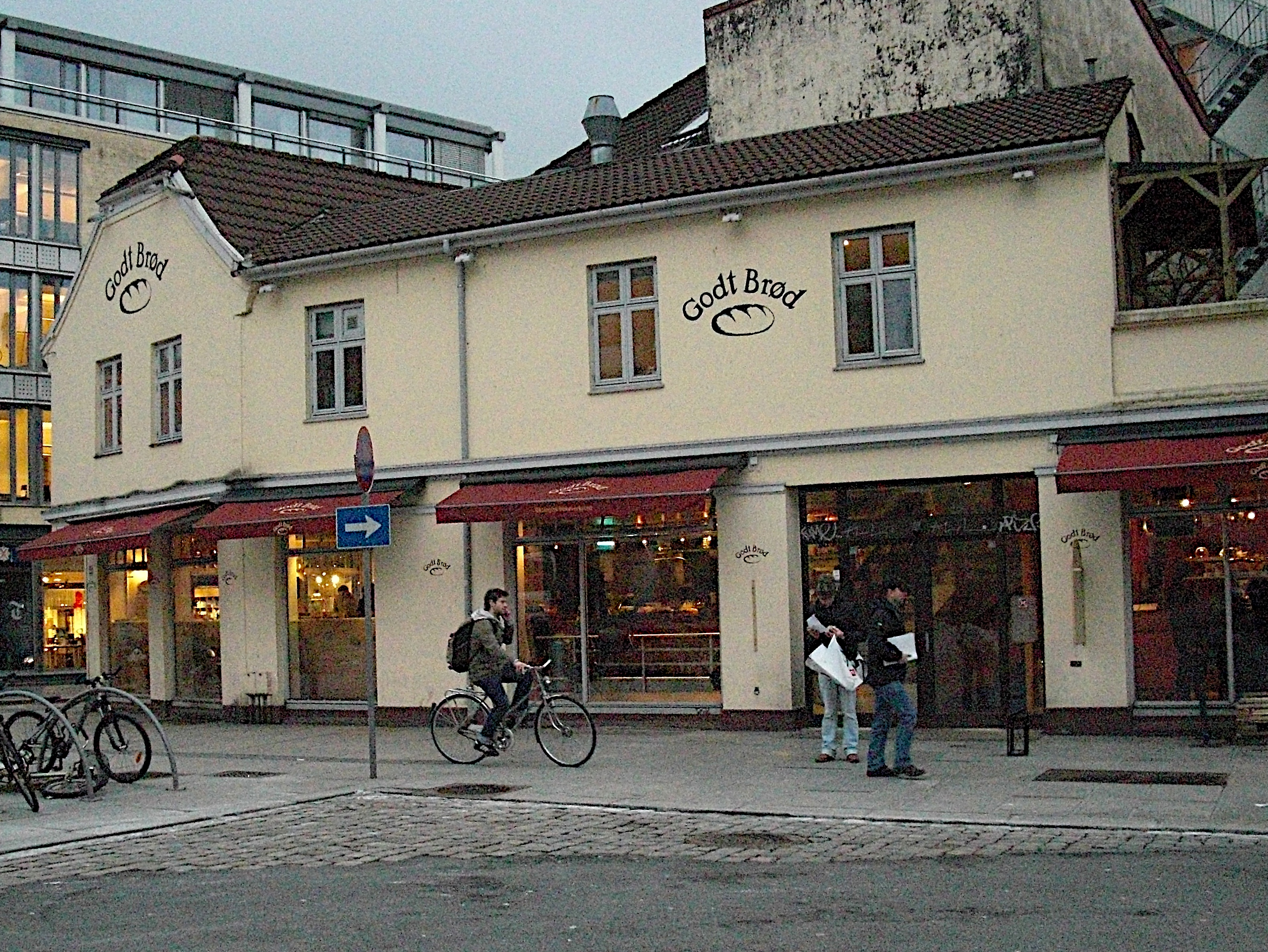 Vestre_Torvgate.2, Bergen